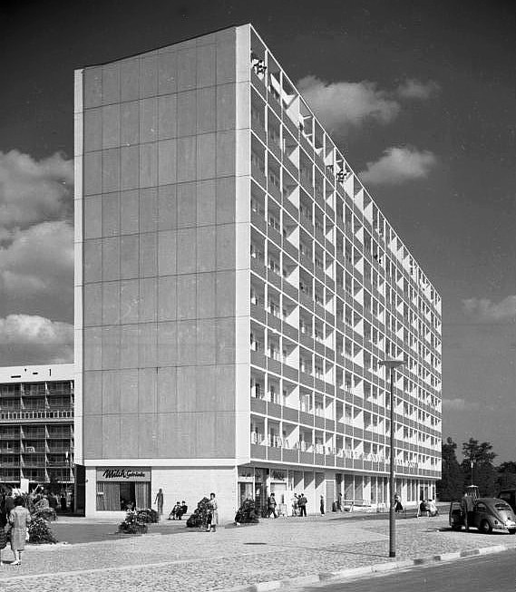 Interbau, Berlin 10 geschossiges Wohnhaus, Architekten Fritz Jaenecke (Deutschland) und Sten Samuelson (Schweden)